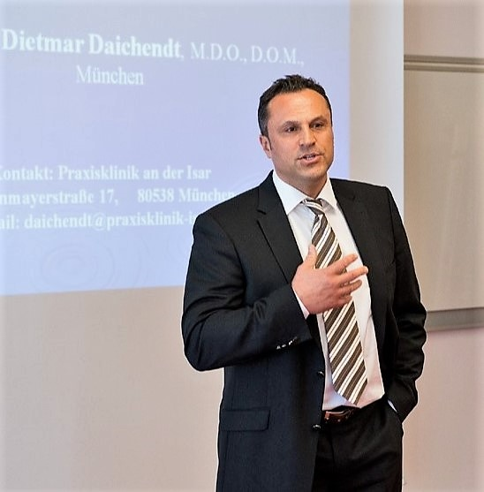 Dietmar Daichendt, Vorlesung, München